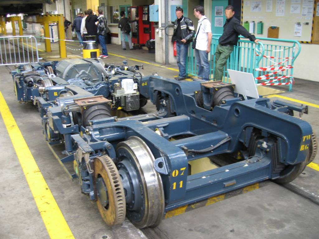 Bogie d'un TFS de la ligne T1 du tramway de Paris. JPO Atelier de Bobigny 24/05/2008.